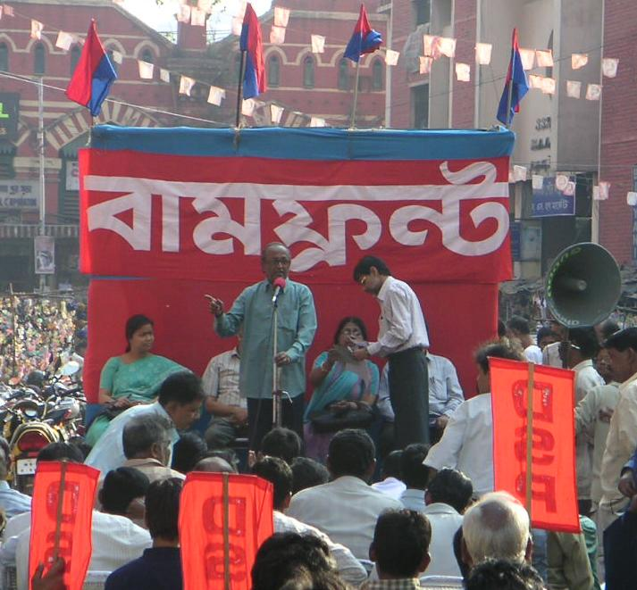 Öppet möte med Democratic Socialist Party i Kolkata inför Lok Sabhavalet 2004. Texten på podiet är "Bamfront" (Left Front).